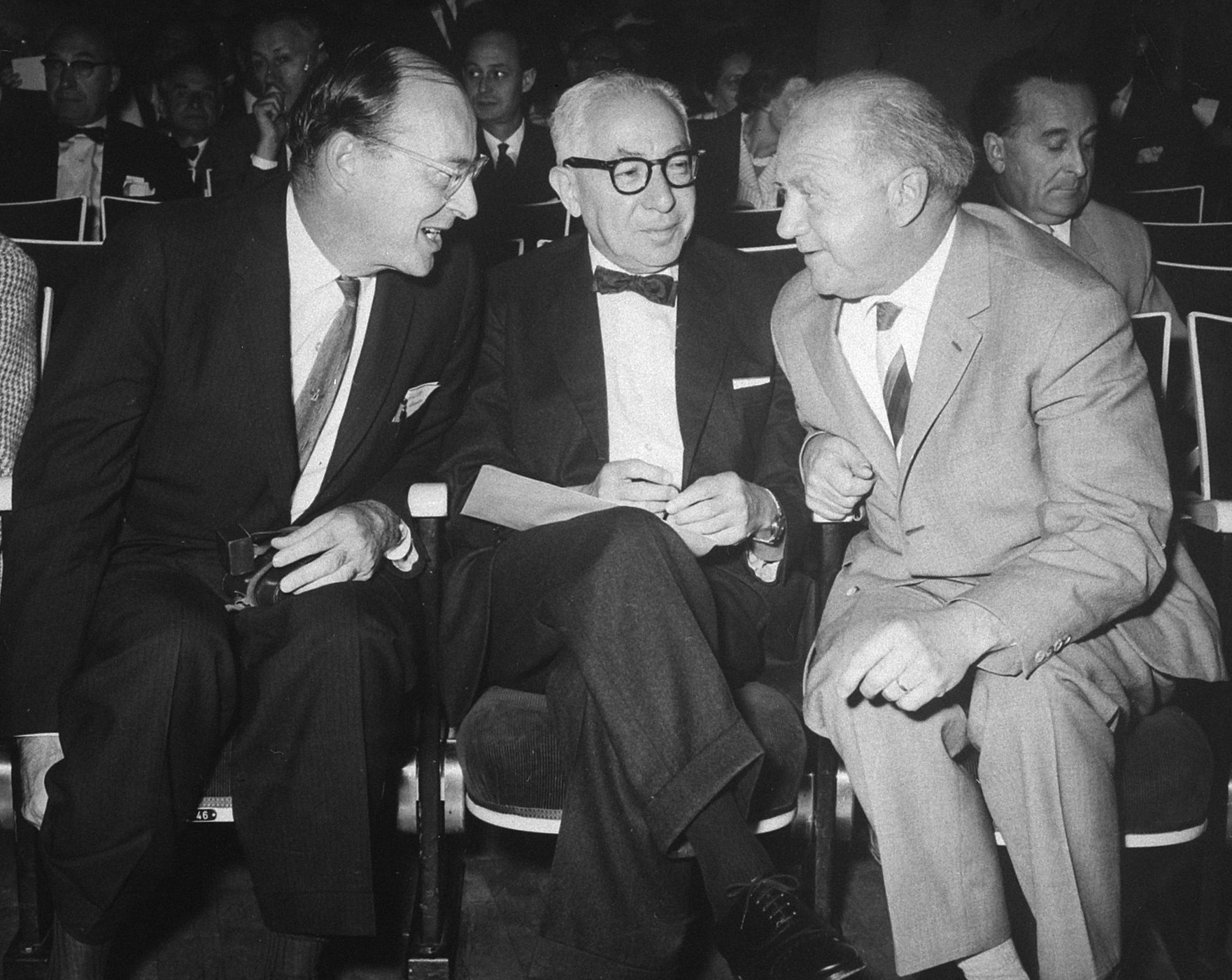 Nobelprijswinnaar ( prof. dr. John Bardeen (VS) prof. dr. I.J. Rabi (New york) en prof. dr. Werner Heisenberg )